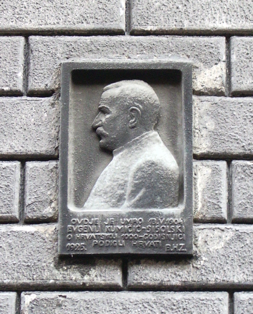 Spomen ploča Eugenu Kumičiću na kući u Palmotićevoj ulici u Zagrebu. Ovdje je umro 13. V. 1904 Evgenij Kumičić-Sisolski. O hrvatskoj 1000-godišnjici podigli hrvati 1925. B. H. Z.